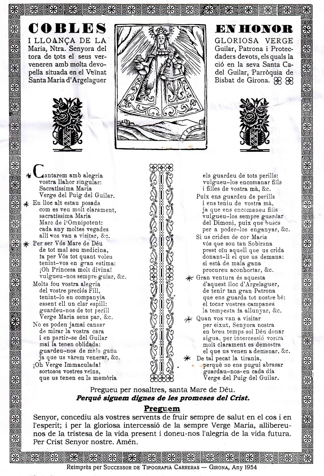 Cobles a la Mare de Déu del Guilar. Argelaguer (La Garrotxa, Girona) COBLES EN HONOR I LLOANÇA DE LA GLORIOSA VERGE MARIA, NTRA. SENYORA DEL GUILAR, PATRONA I PROTECTORA DE TOTS ELS SEUS VERDADERS DEVOTS, ELS QUALS LA VENEREN AMB MOLTA DEVOCIÓ EN LA SEVA SANTA CAPELLA SITUADA EN EL VEÏNAT DEL GUILAR, PARRÒQUIA DE SANTA MARIA D'ARGELAGUER, BISBAT DE GIRONA. Cantarem amb alegria vostra llahor singular: Sacratíssima Maria Verge del Puig del Guilar. En lloc alt estau posada com es veu molt clarament, sacratíssima Maria Mare de l'Omnipotent: cada any moltes vegades allí vos van a visitar. ... Gran ventura és aquesta d'aquest lloc d'Argelaguer, de tenir tan gran Patrona que ens guarda tot nostre bé: el tocar vostres campanes la tempesta fa allunyar. ...